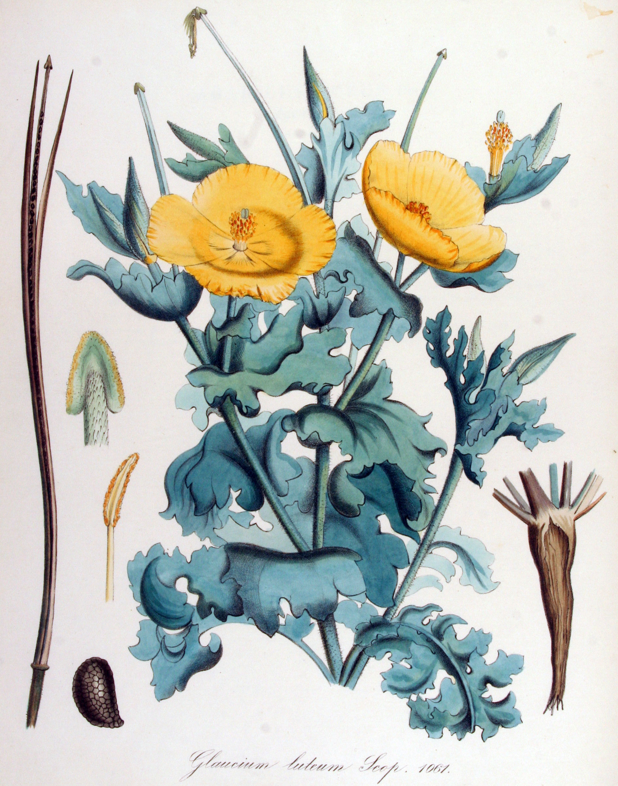 Glaucium flavum Cranz (Syn. Glaucium luteum L.)